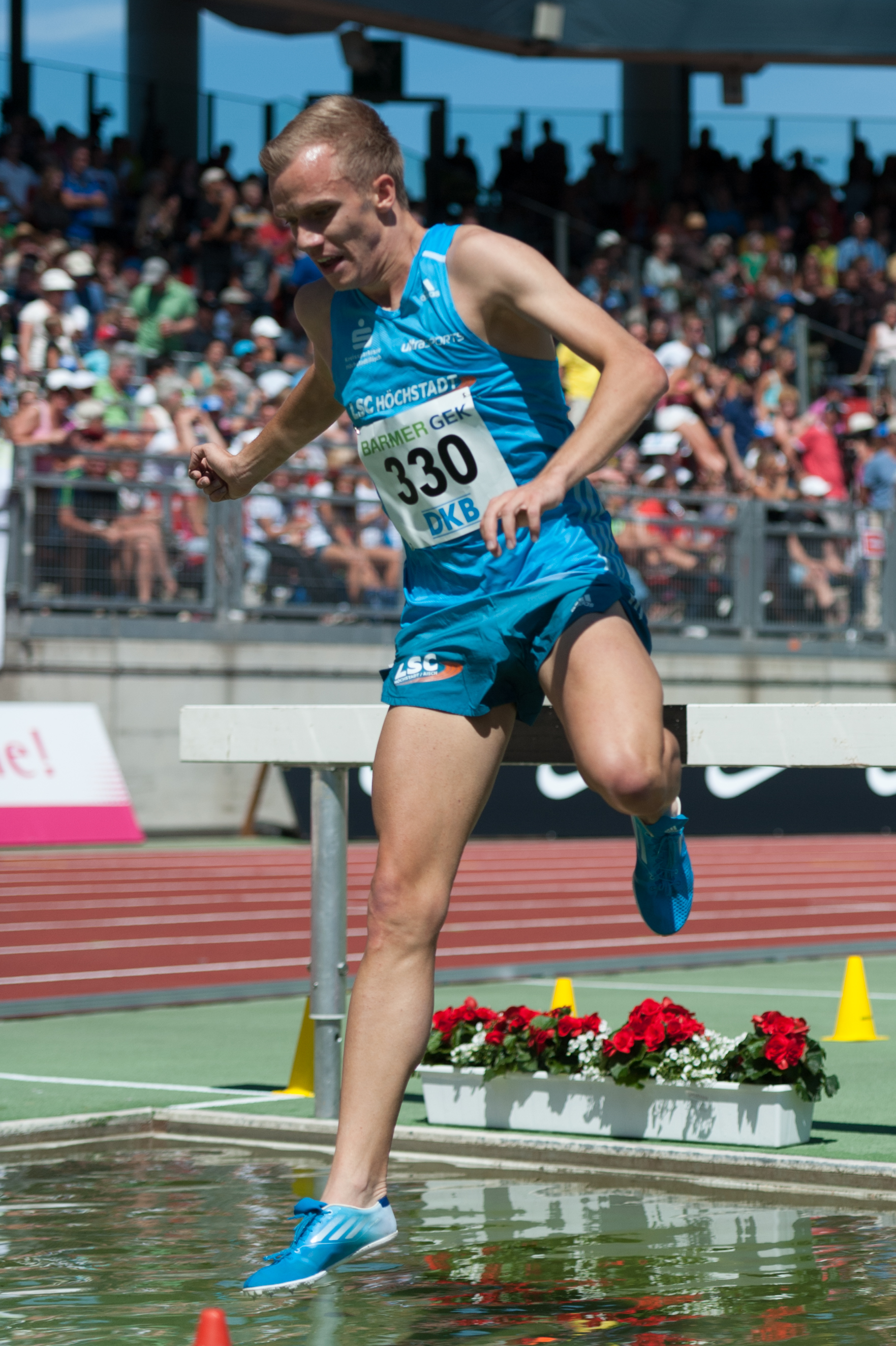 Deutsche Leichtathletik-Meisterschaften 2015: Männer 3000m Hindernis - Martin Grau, LSC Höchstadt/Aisch